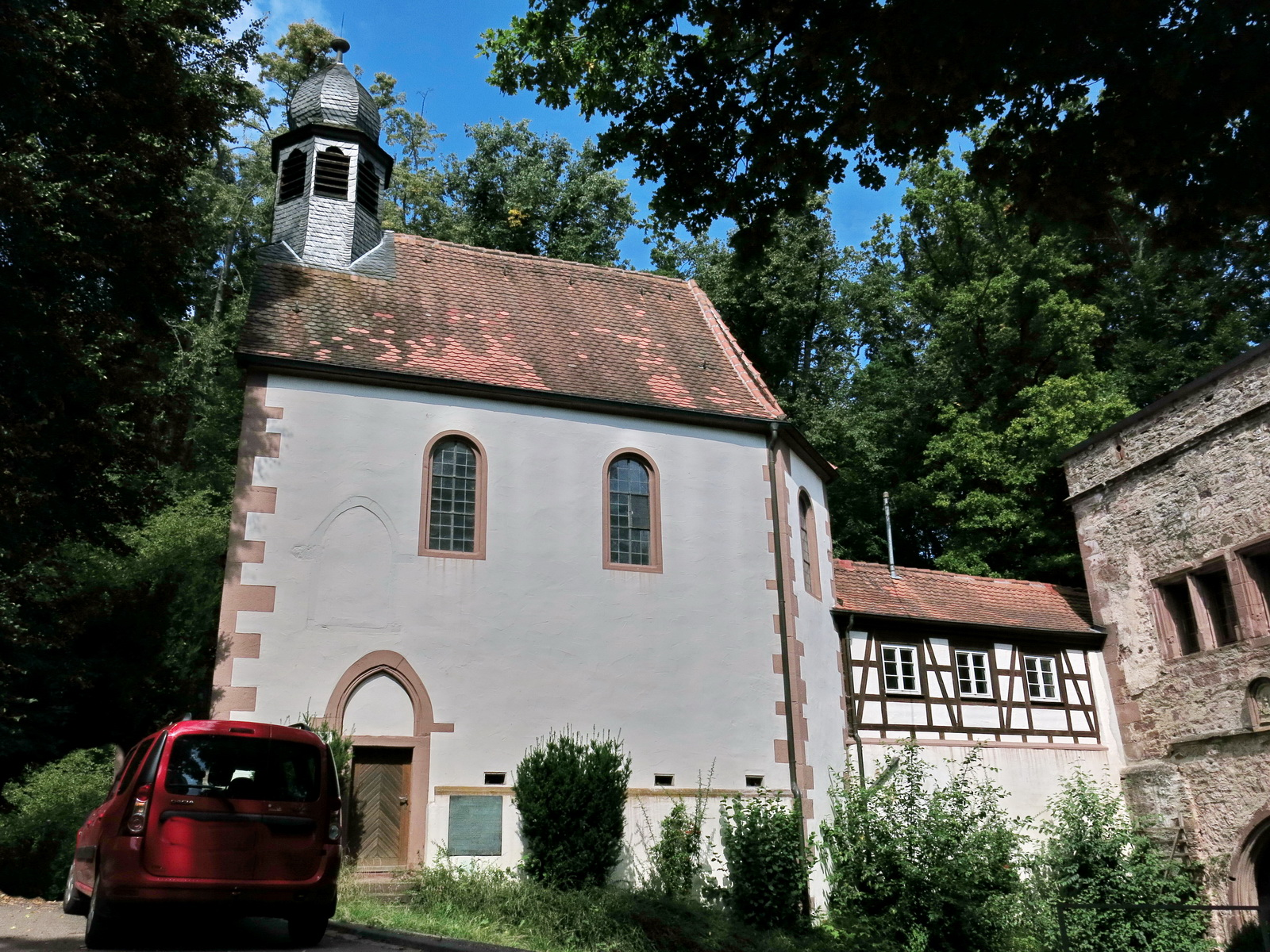 Burg Steinegg (Neuhausen)